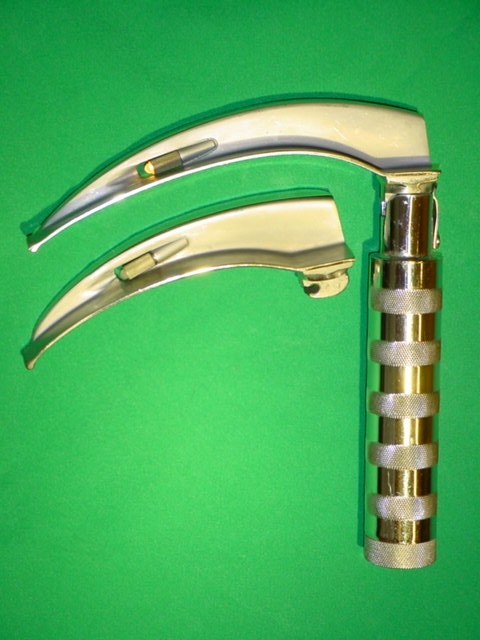 Laryngoskop, 2 x Macintosh-Spatel